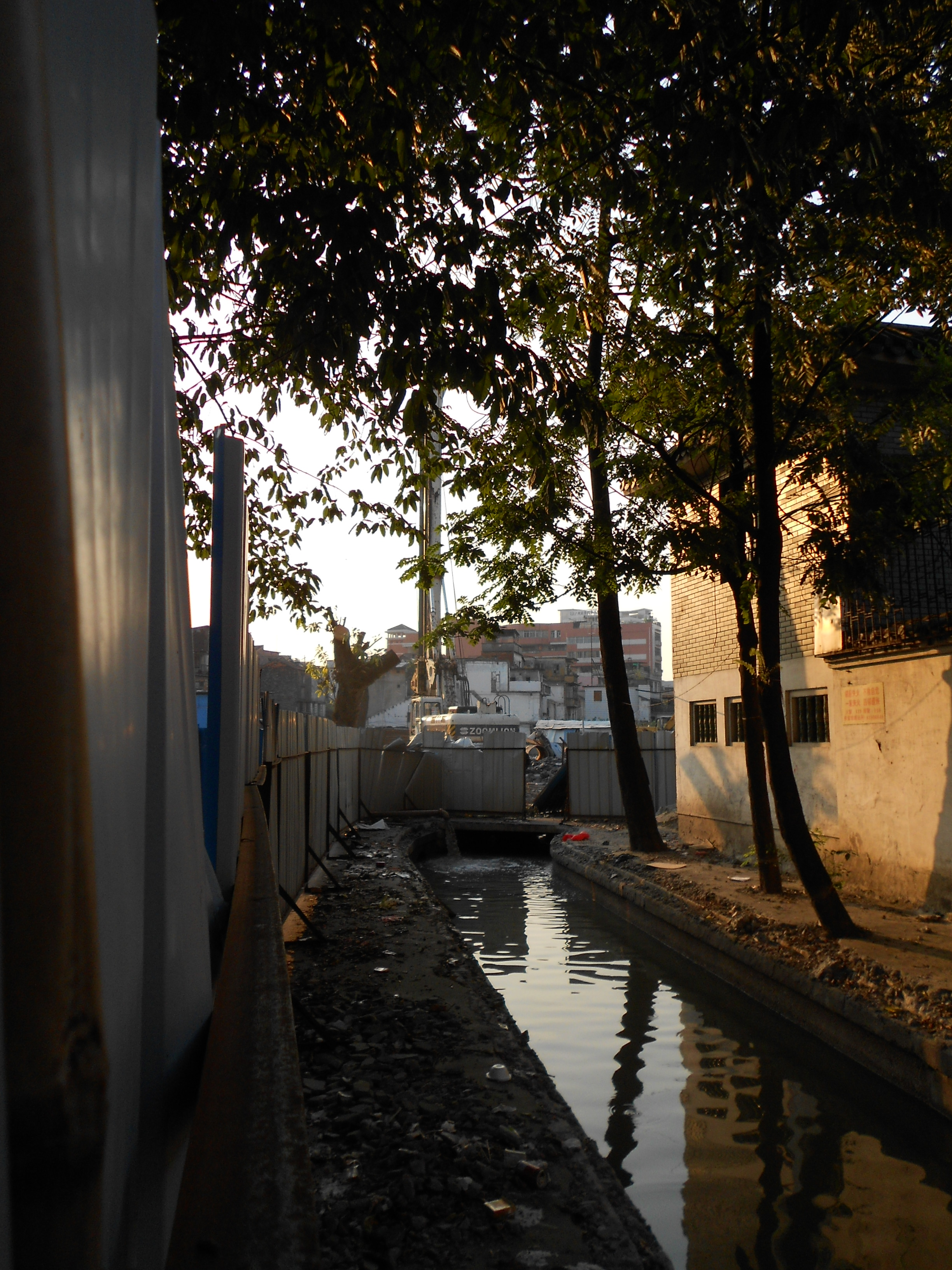 恩寧路舊城改造項目及荔枝灣揭蓋復涌工程，這是泰華樓旁臭涌剛揭蓋時的情景。後來泰華樓建築因此工程被損壞。